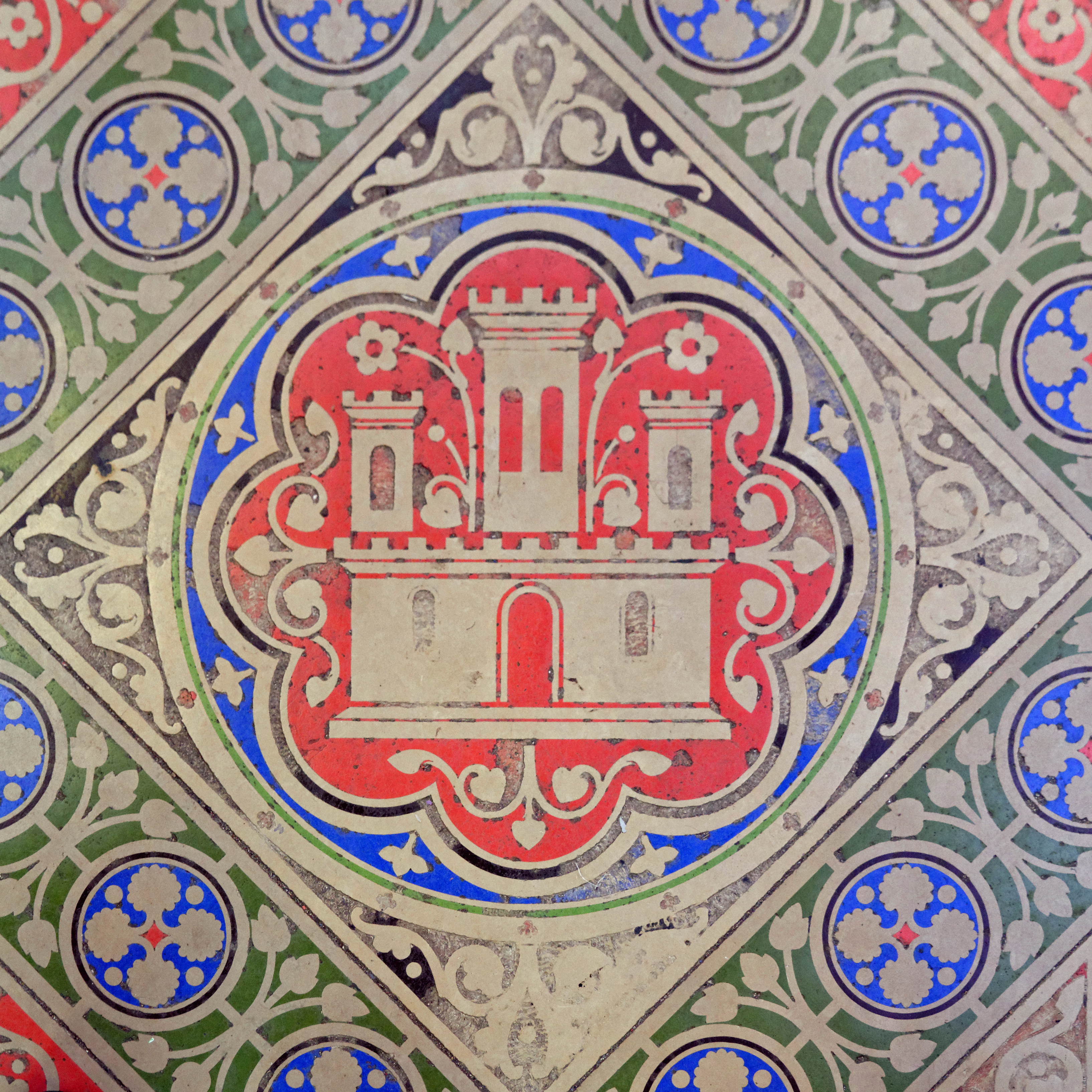 Sainte Chapelle (Boulevard du Palais Paris, France) .